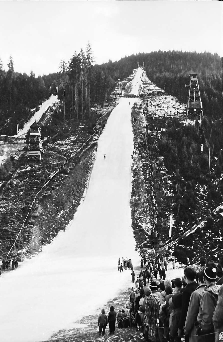 Hochfirstschanze ski jumping hill in Titisee-Neustadt, Germany